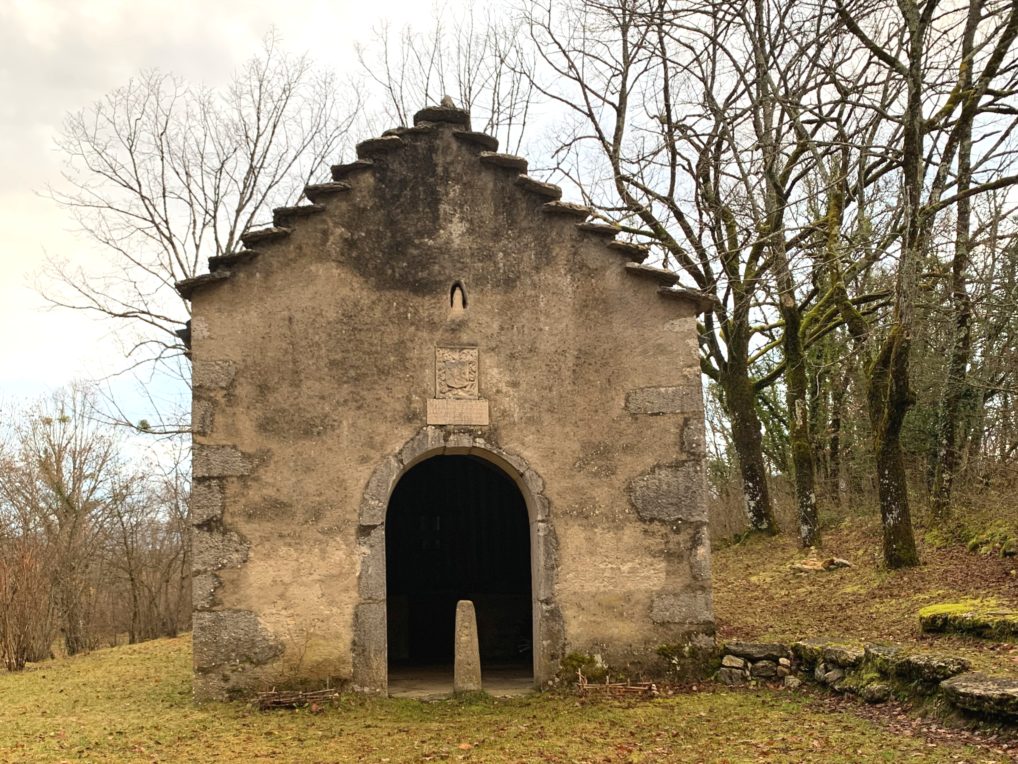 Chapelle Sainte-Anne de Contrevoz (décembre 2019).